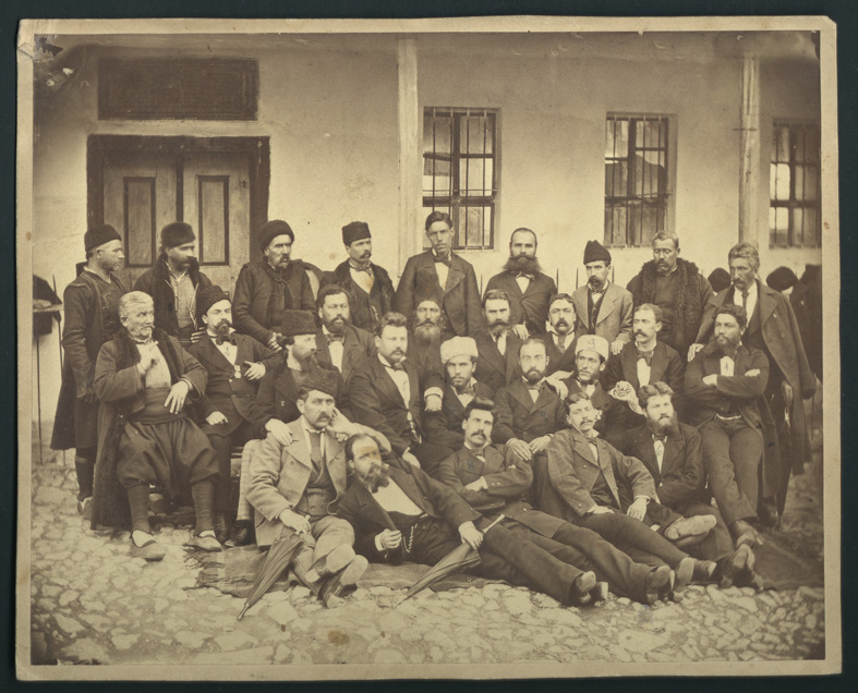 Делегатите от Македония и Тракия в в българското Учредително събрание в Търново, 1879